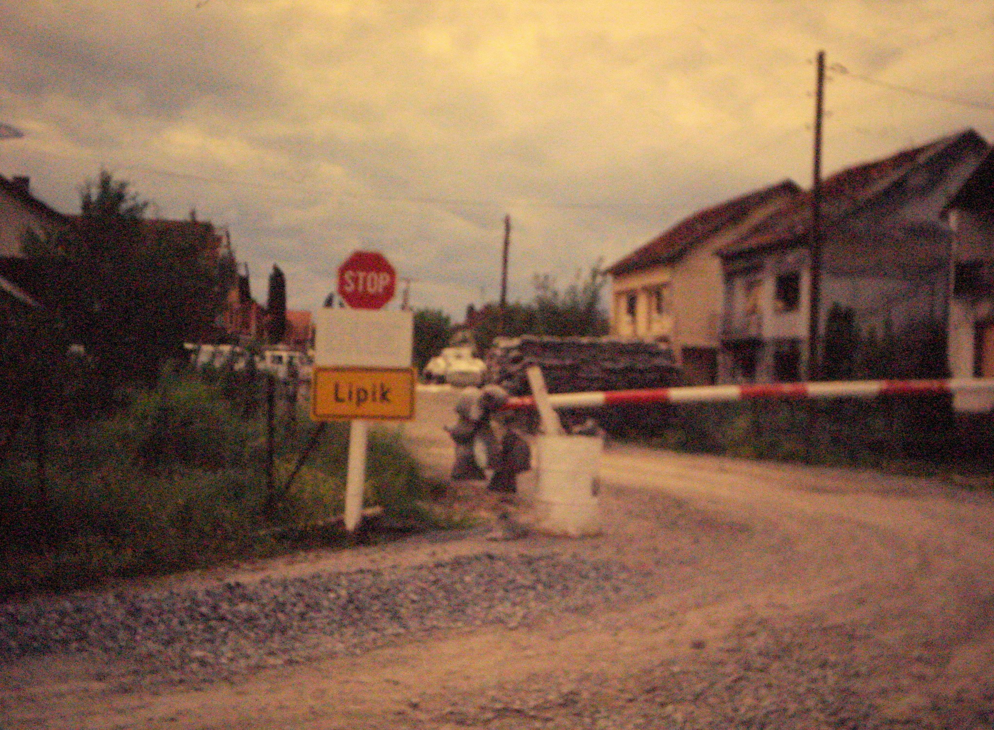 Base de UNPROFOR en Lipik. Mediados de 1994.